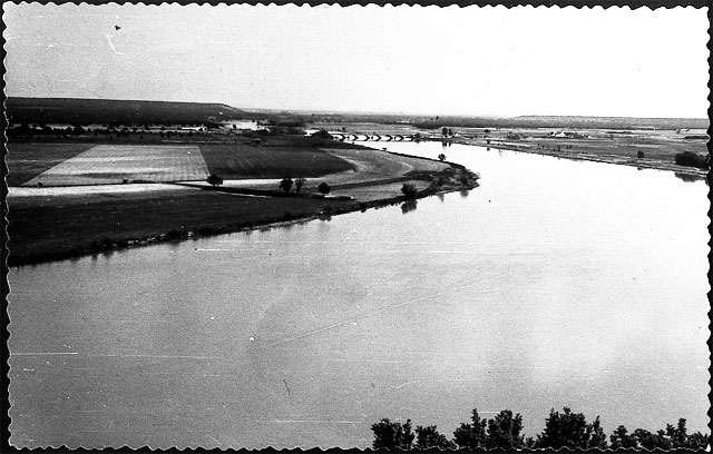 Panorámica del río Duero - Castronuño (Valladolid) - El río Duero a su paso por Castronuño en foto de Parra (hijo). - Tarjeta postal. Papel 144 x 90 B/N